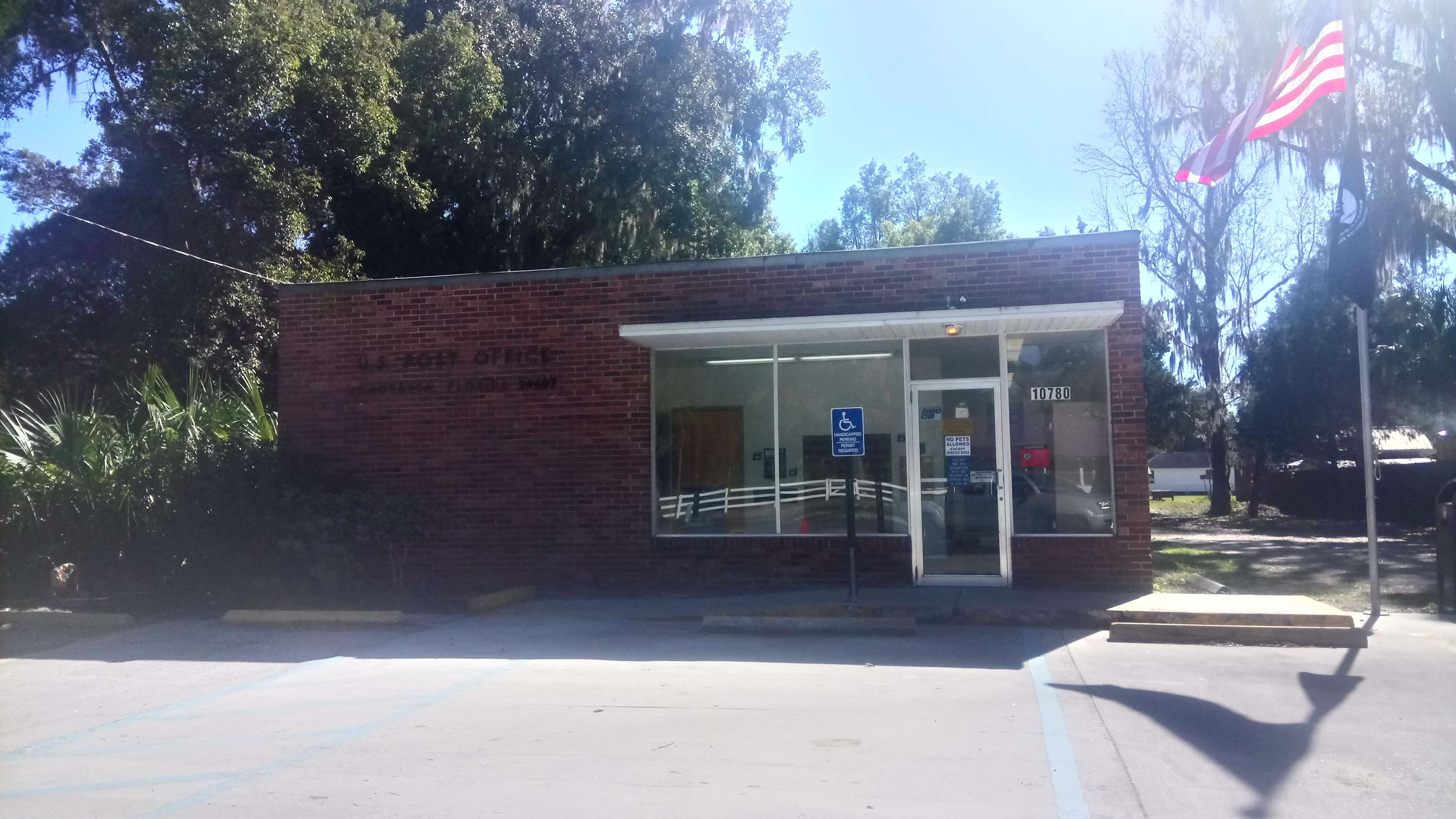 Homosassa Post Office